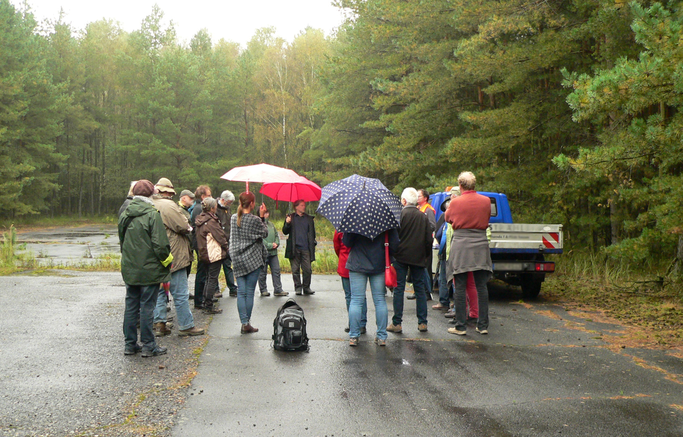 Besichtigung der Bohrstelle 1004 bei einer archäologischen Exkursion im Rahmen der 45. Herbsttagung des Heimatkundlichen Arbeitskreises Lüchow-Dannenberg (HALD) und des Dannenberger Arbeitskreises für Landeskunde und Heimatpflege (DALAH), 23./24. September 2017